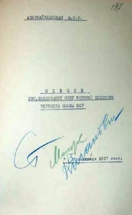 Список лиц, подлежащих суду Военной коллегией Верховного суда Союза ССР от Азербайджанской ССР